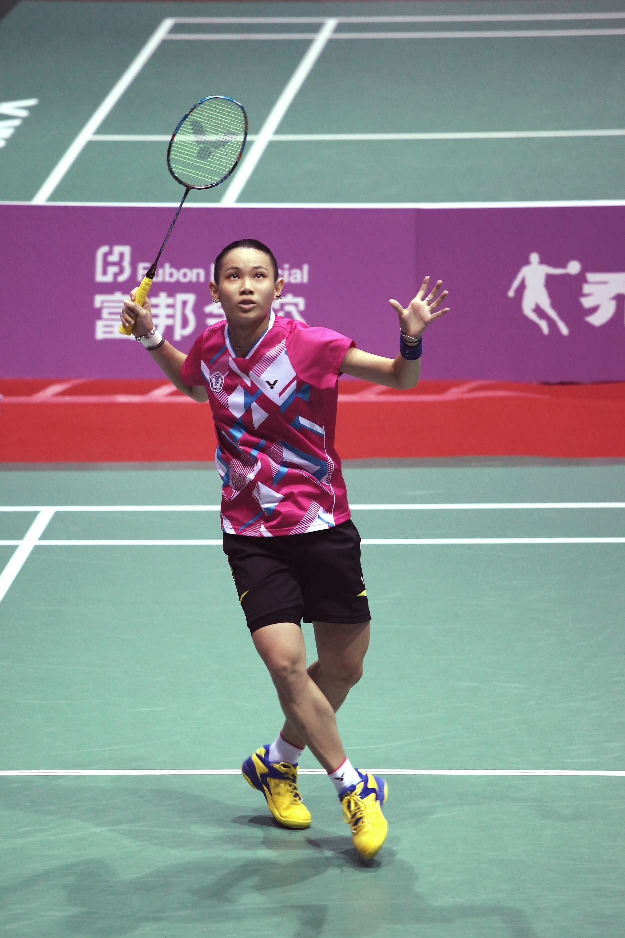 2017 台北世大運團體女單 戴資穎 對 Eduarda Rodrig